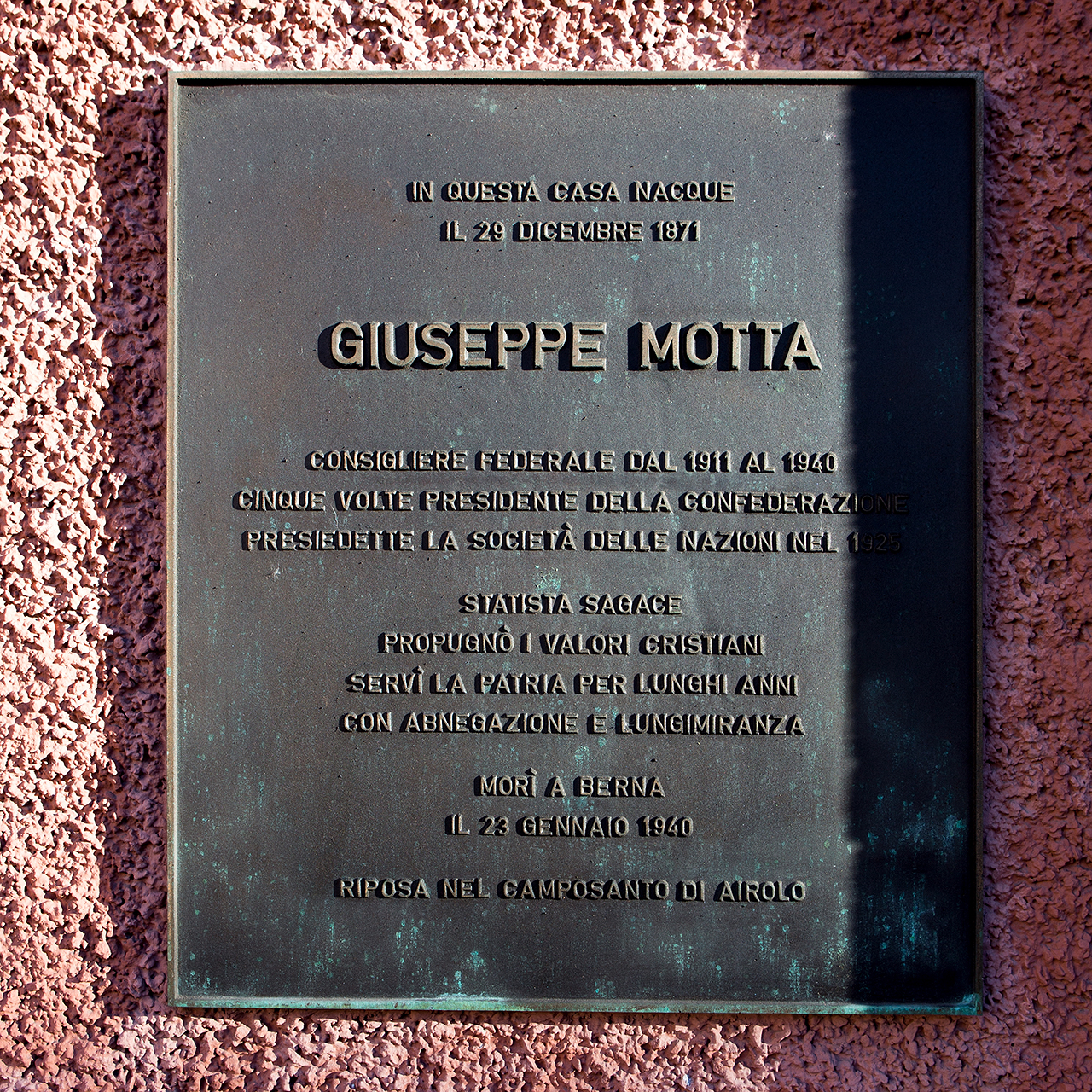 Hinweistafel am Geburtshaus von Giuseppe Motta in Airolo, Bundesrat